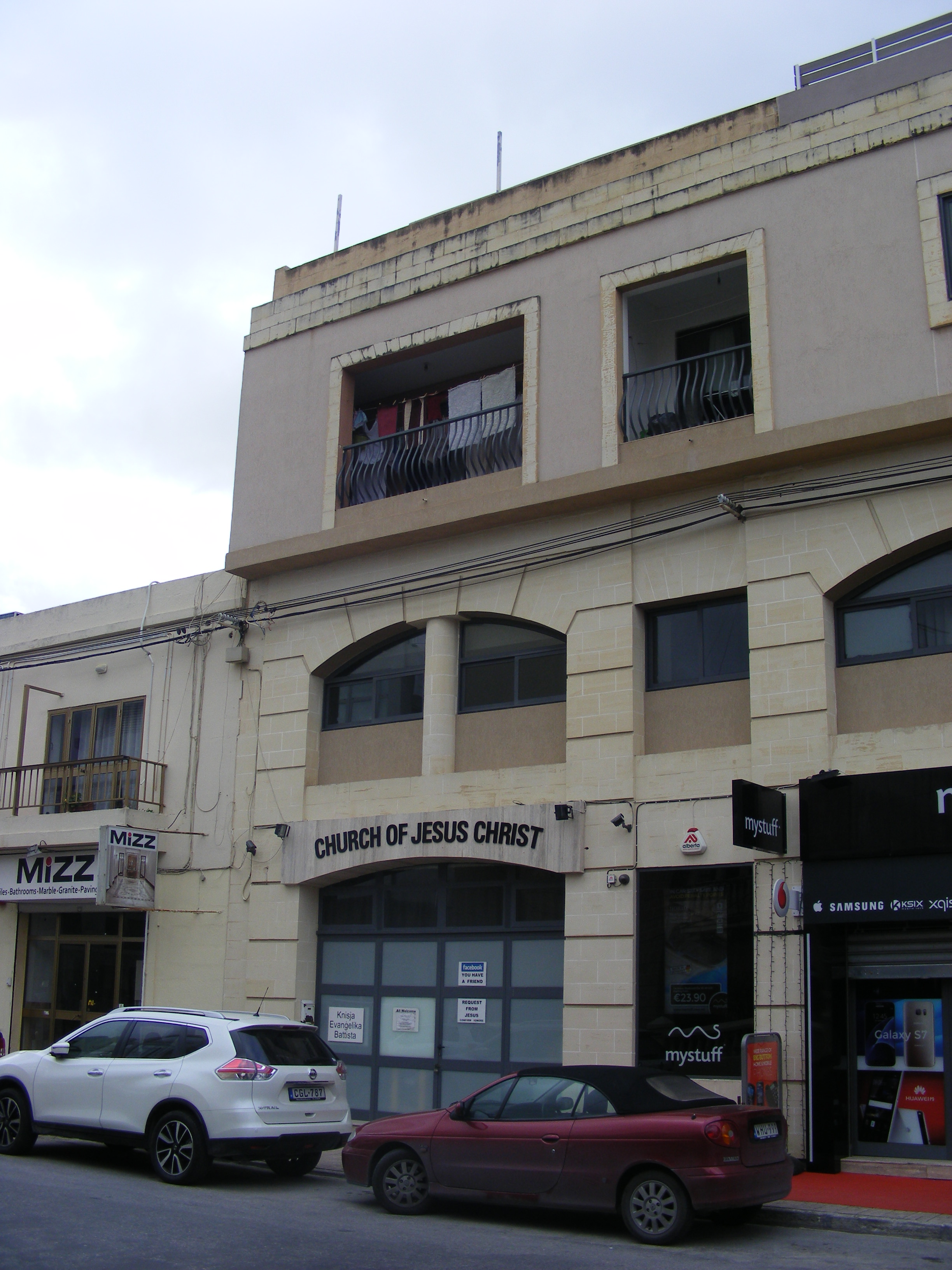 Kościół Baptystów Ewangelicznych, Mosta, Malta